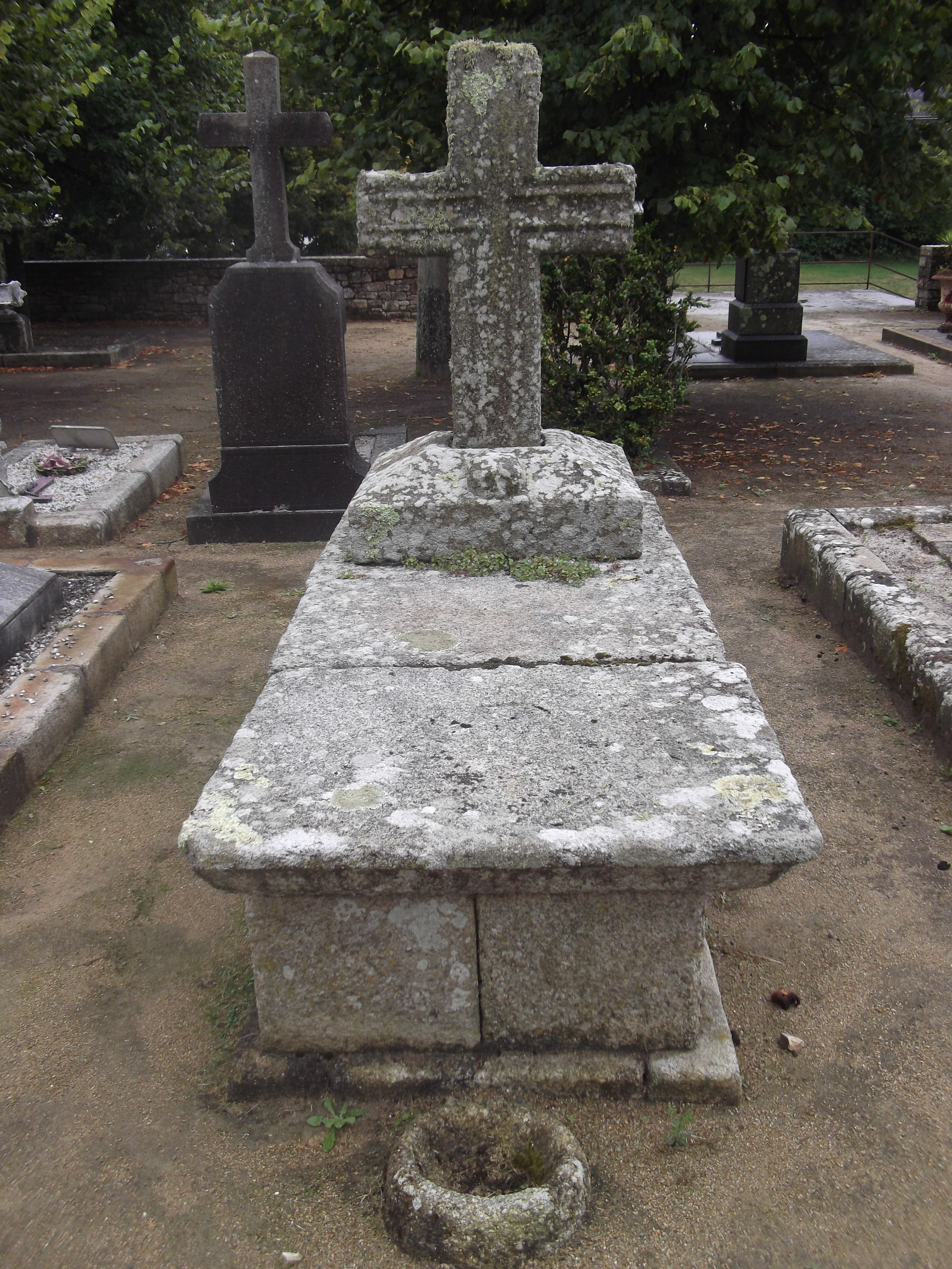 Tombe en granite, avec bénitier à l'avant